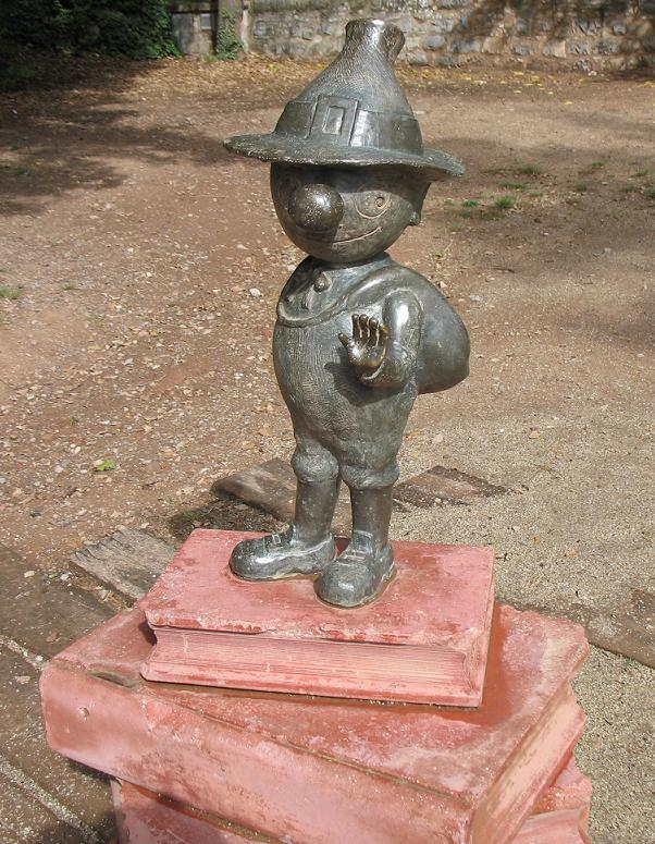 Escultura de "Ot el brujo" en el Parc Municipal de Moià